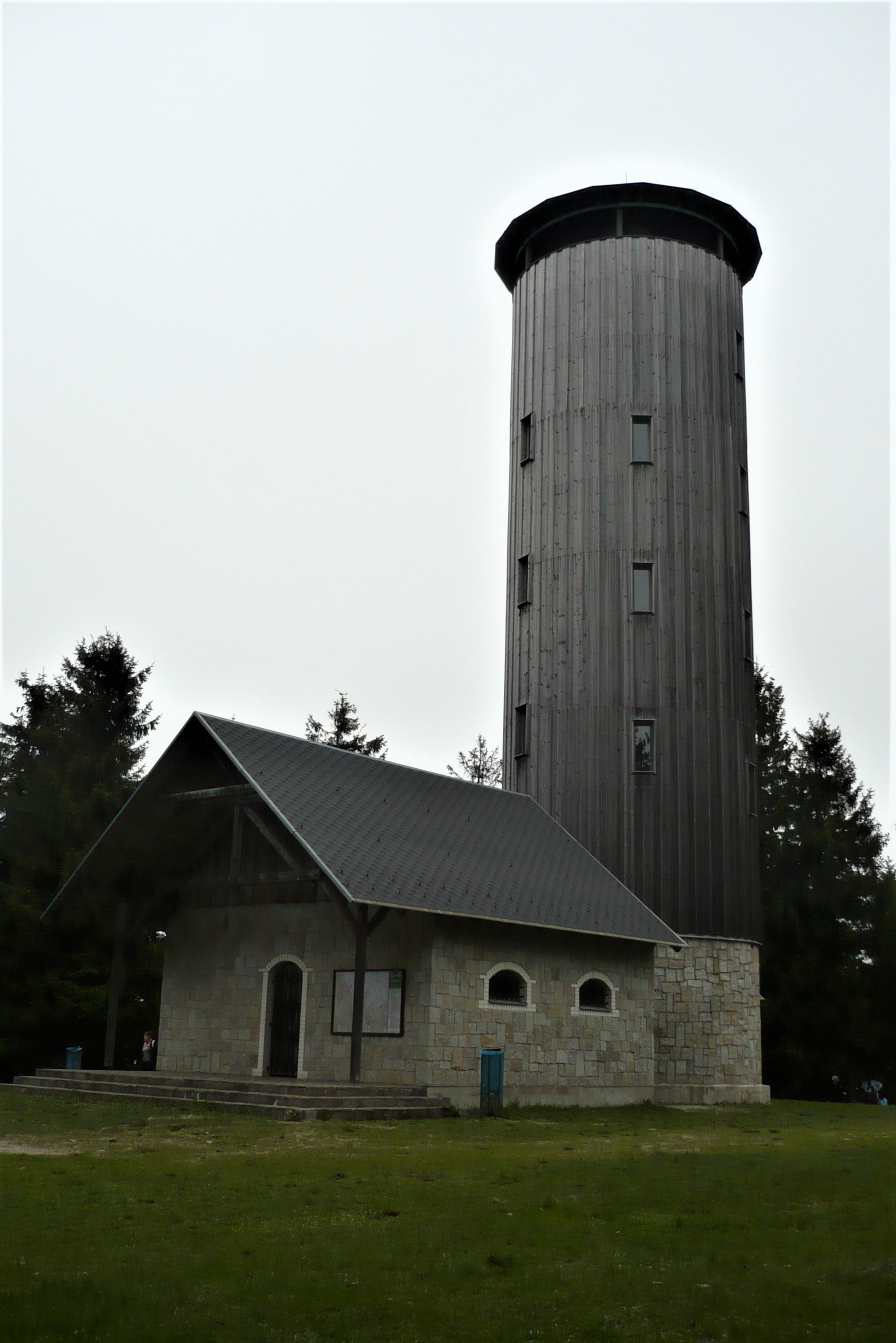 Borówkowa. Wieża